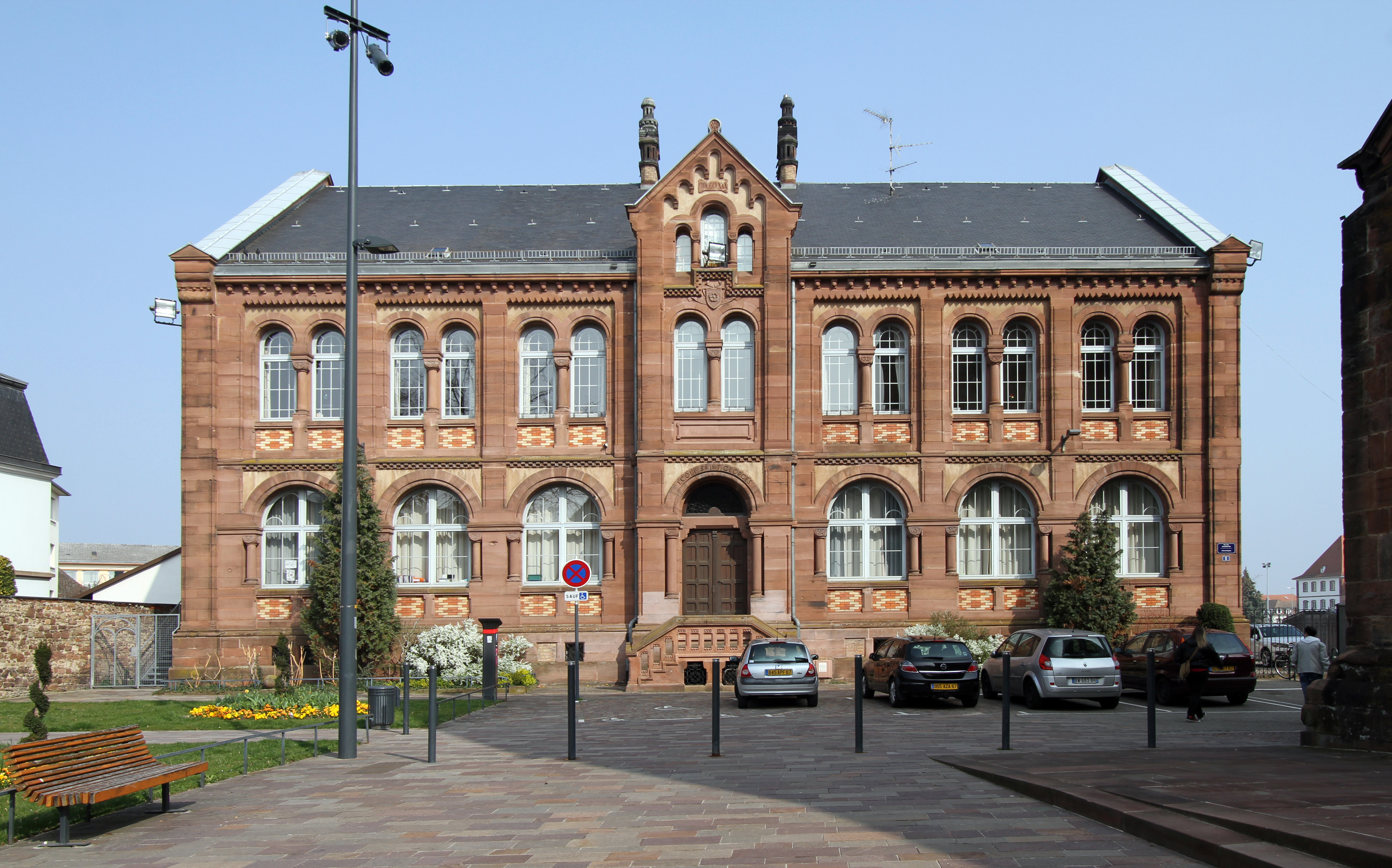 Hagenau